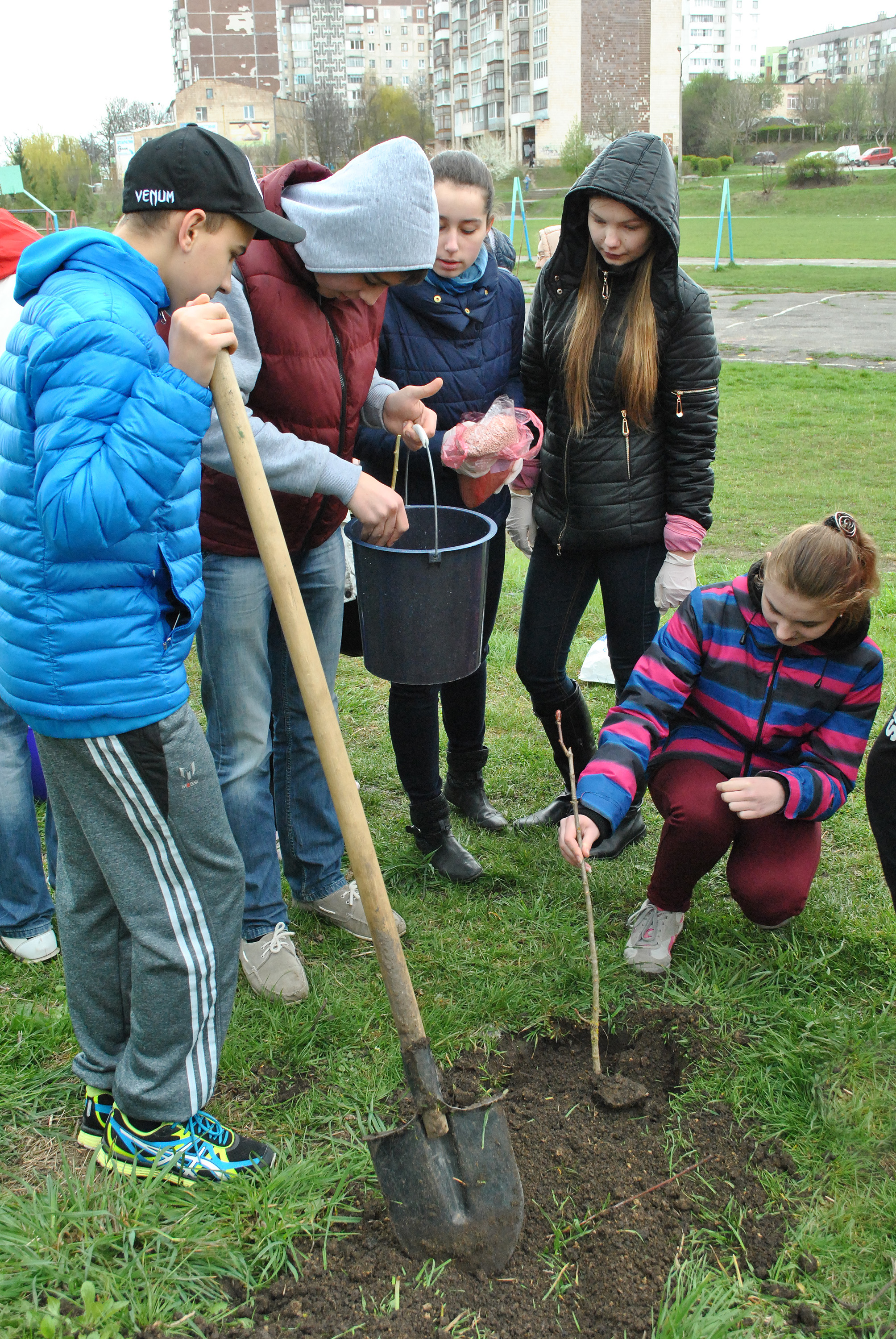 Школярі Тернопільської спеціалізованої школи І-ІІІ ступенів № 29 з поглибленим вивченням іноземних мов висаджують дерева на честь 70-ї річниці визволення Тернополя від нацистів.